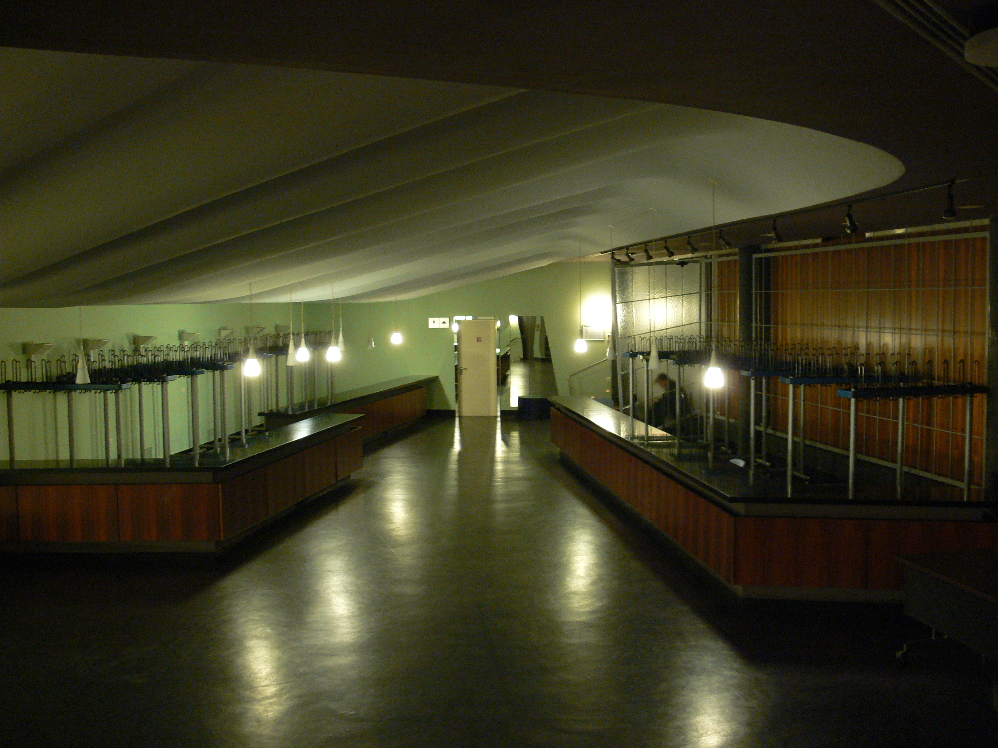 Liederhalle Stuttgart Garderobe des Mozartsaals